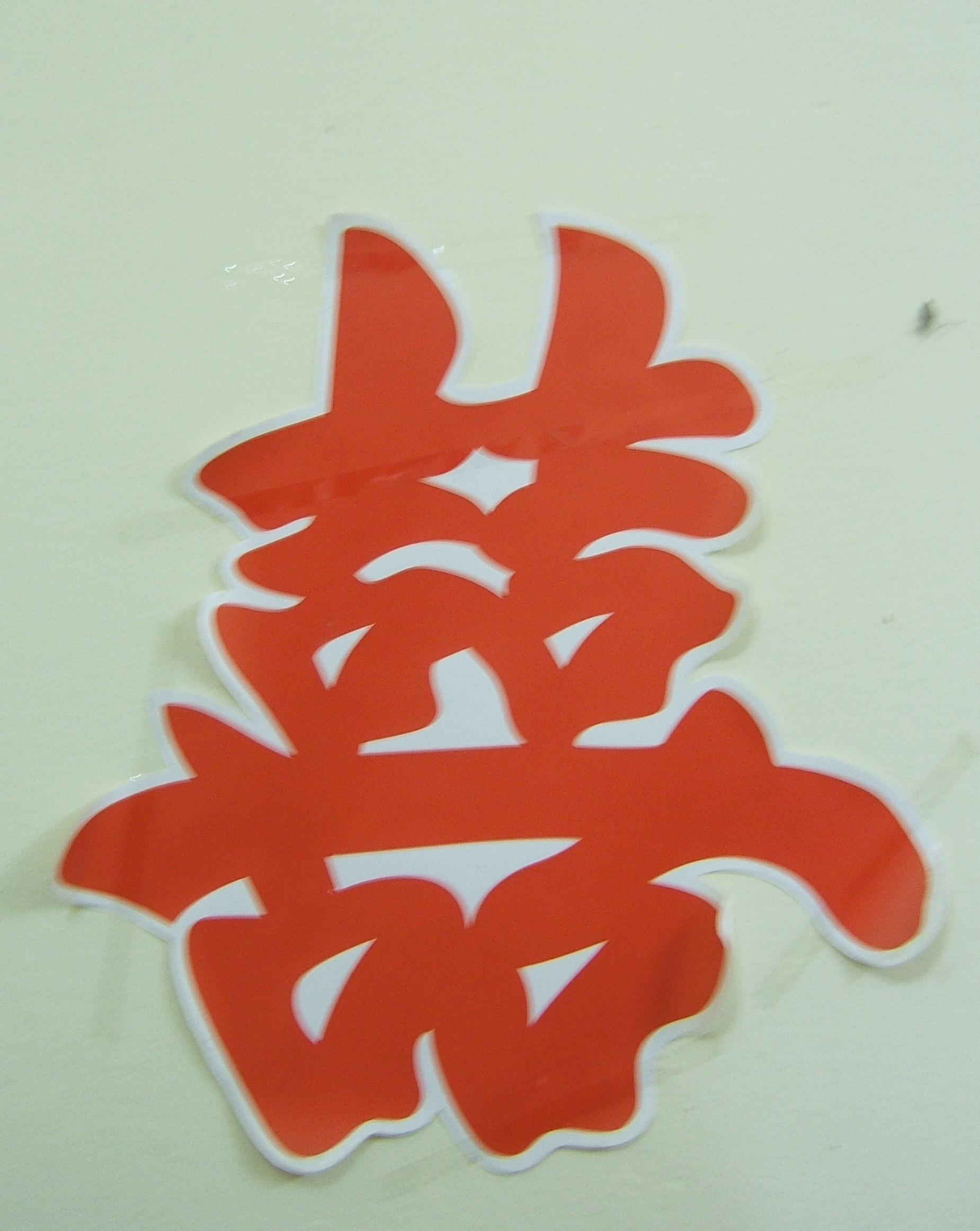 Biểu trưng cưới, chụp từ một phòng cưới tại Hà Nội